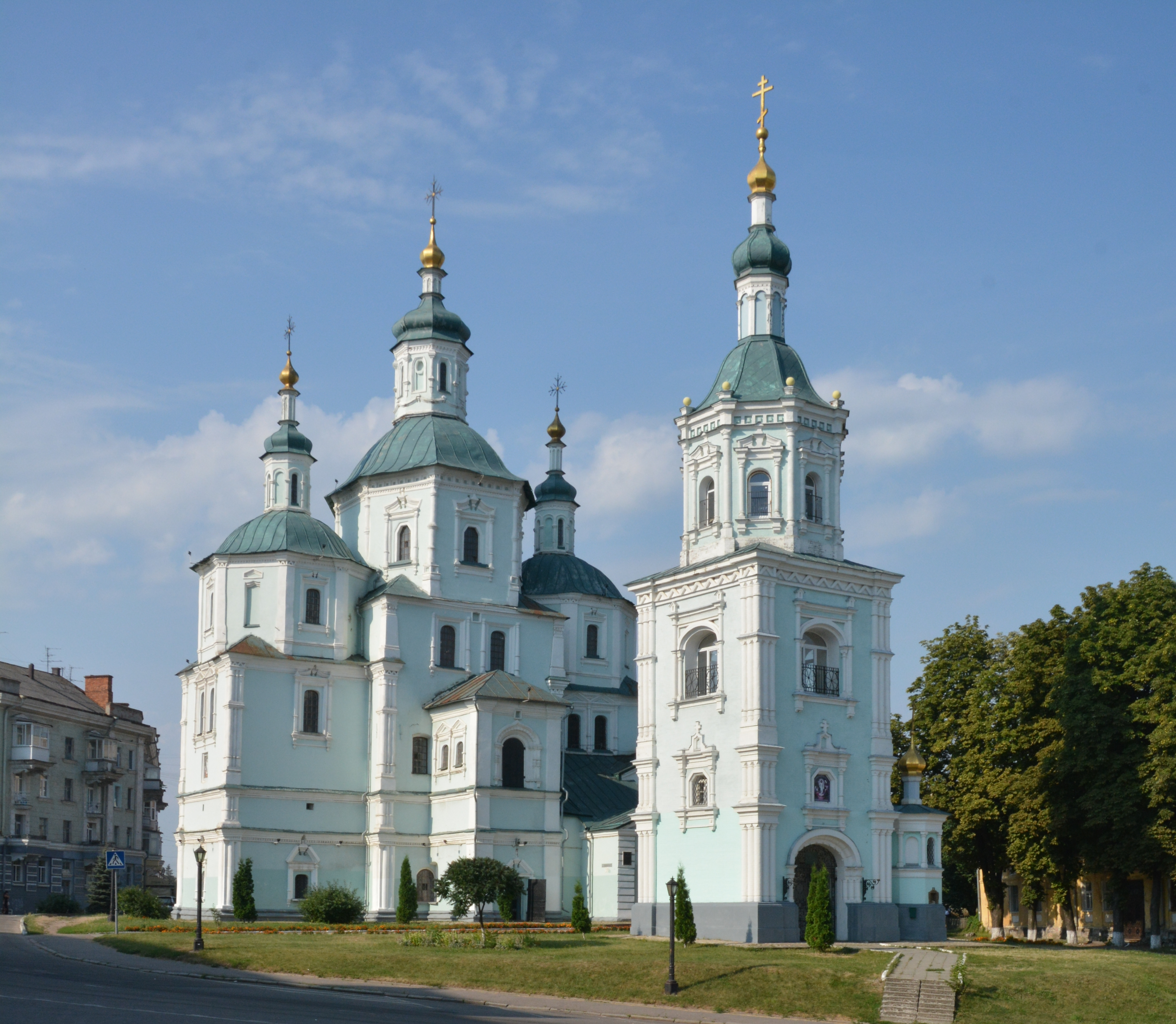 Воскресенська церква (мур.), Суми, пл. Незалежності, 19